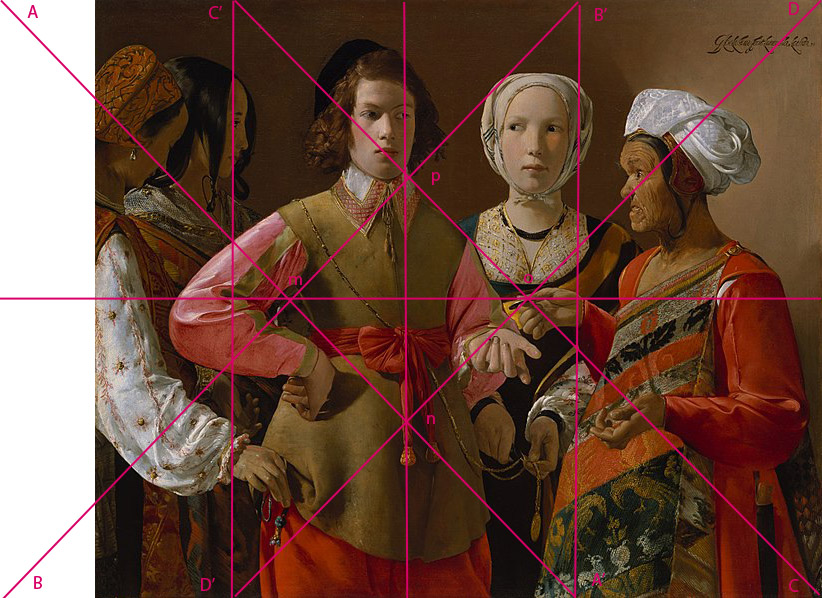 La buenaventura (c. 1630-1640), Georges de la Tour. Proyección según la sección áurea.